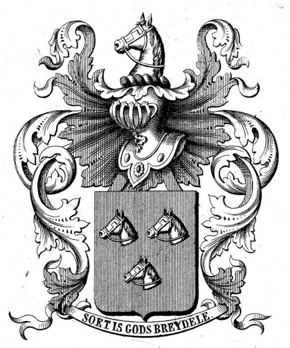 wapenschild breydel ex Ghandavensis